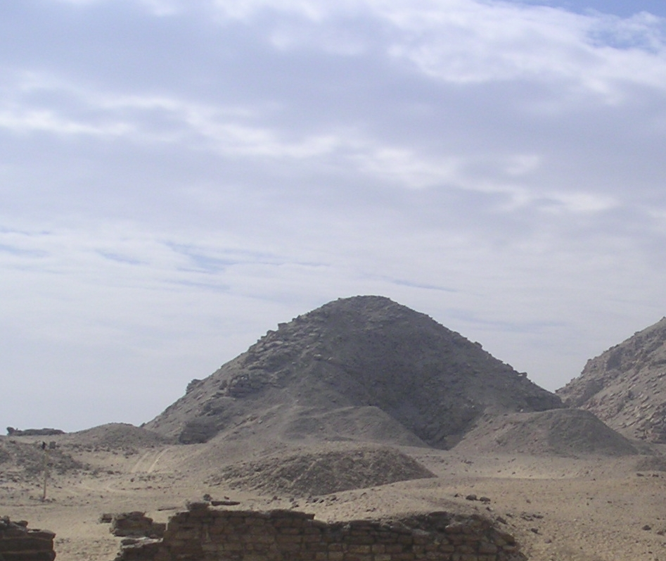 Vue de la face nord de la pyramide de Niouserrê à Abousir - Ve dynastie égyptienne